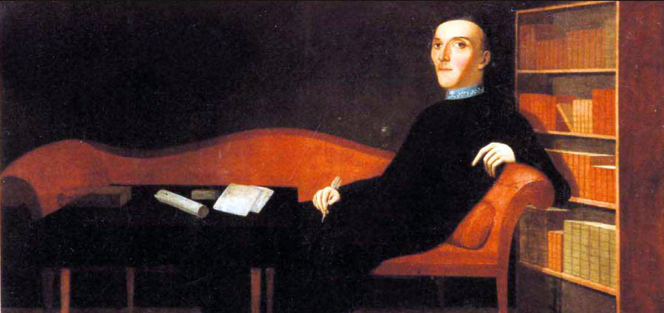 El fraile José Camilo Henríquez González (* Valdivia, Chile, 20 de julio de 1769 - † Santiago de Chile, 16 de marzo de 1825) fue un sacerdote, escritor, político y héroe de la Independencia de Chile.